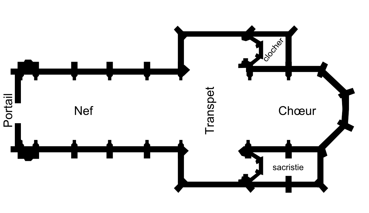 Plan de l'église Saint-Didier de Voreppe (commune de Voreppe, Isère, France)